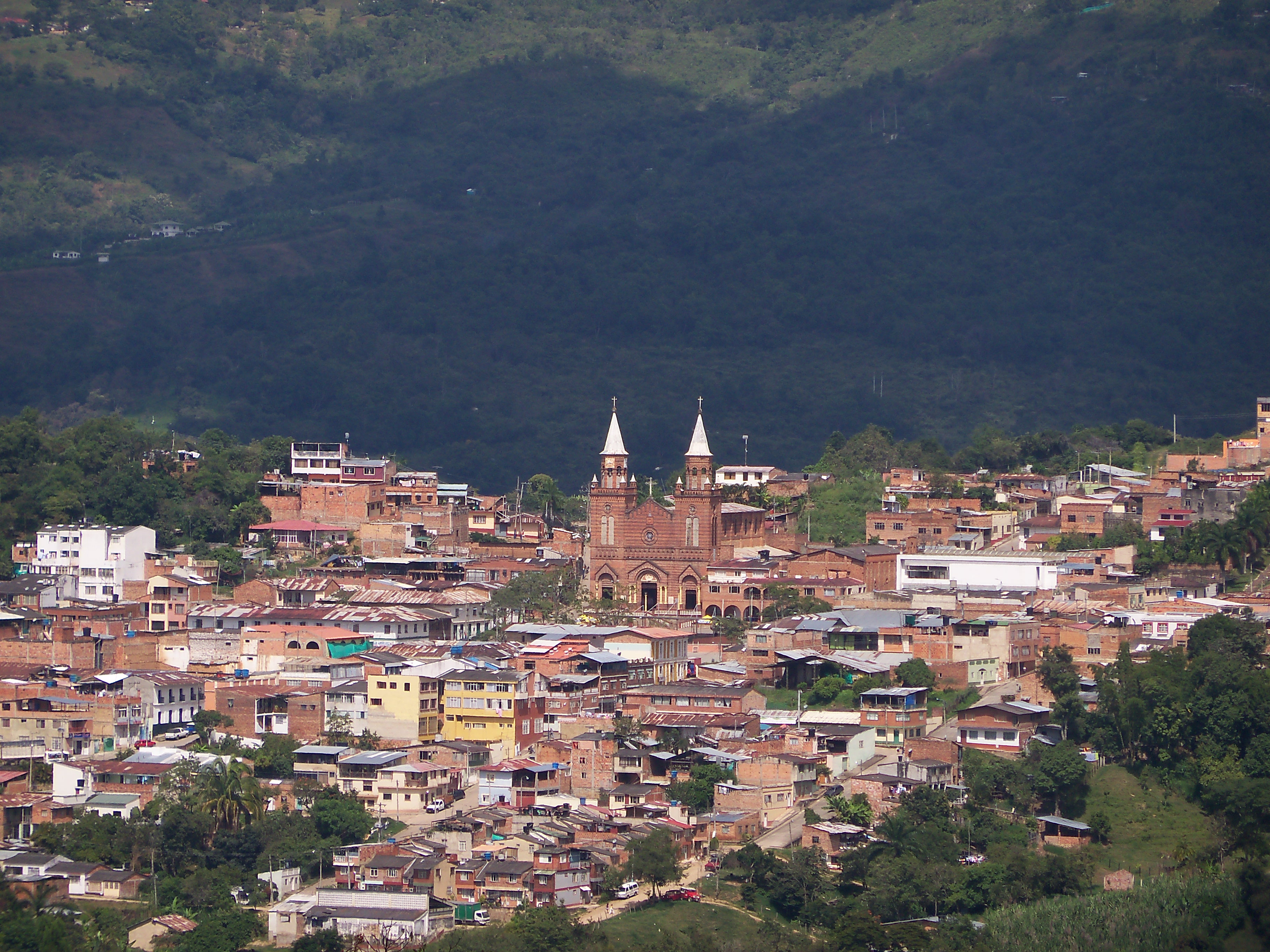 Esta imagen muestra una panorámica del municipio de arbeláez, su iglesia en el centro y su área urbana.